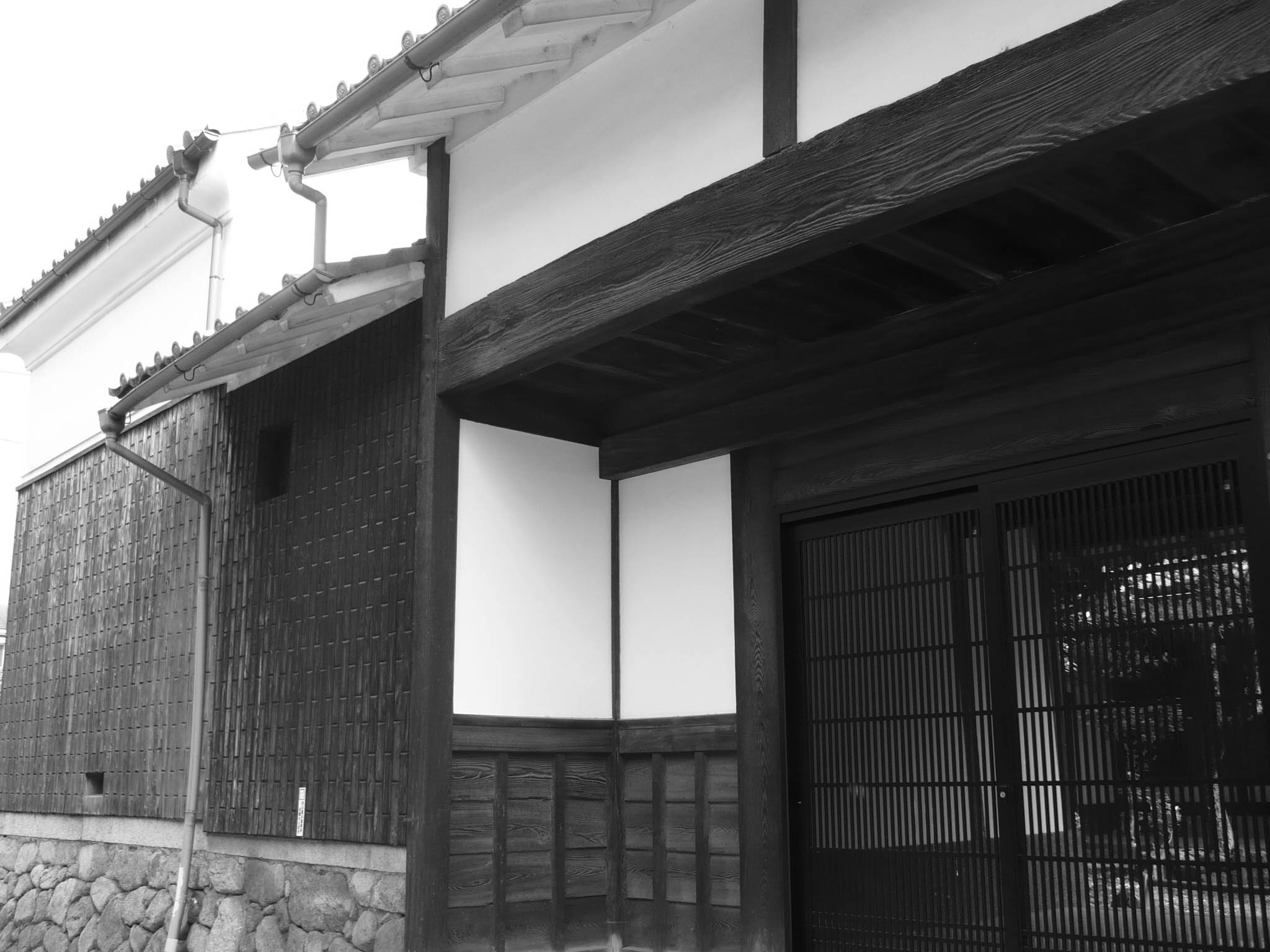 寺内推定地にある純和風建物